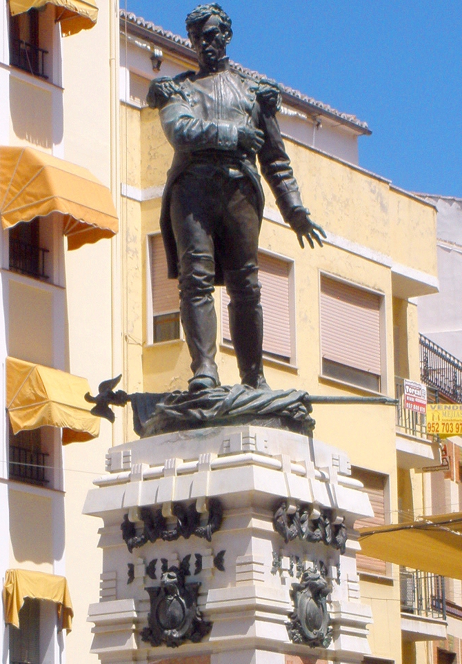 Monumento al Capitán Vicente Moreno Baptista (Antequera, Málaga)